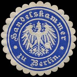 Sealing stamp Title: Handelskammer zu Berlin Description: blau, weiß, geprägt Place: Berlin size: 4 cm